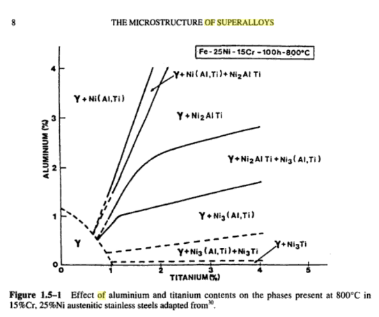 نمودار